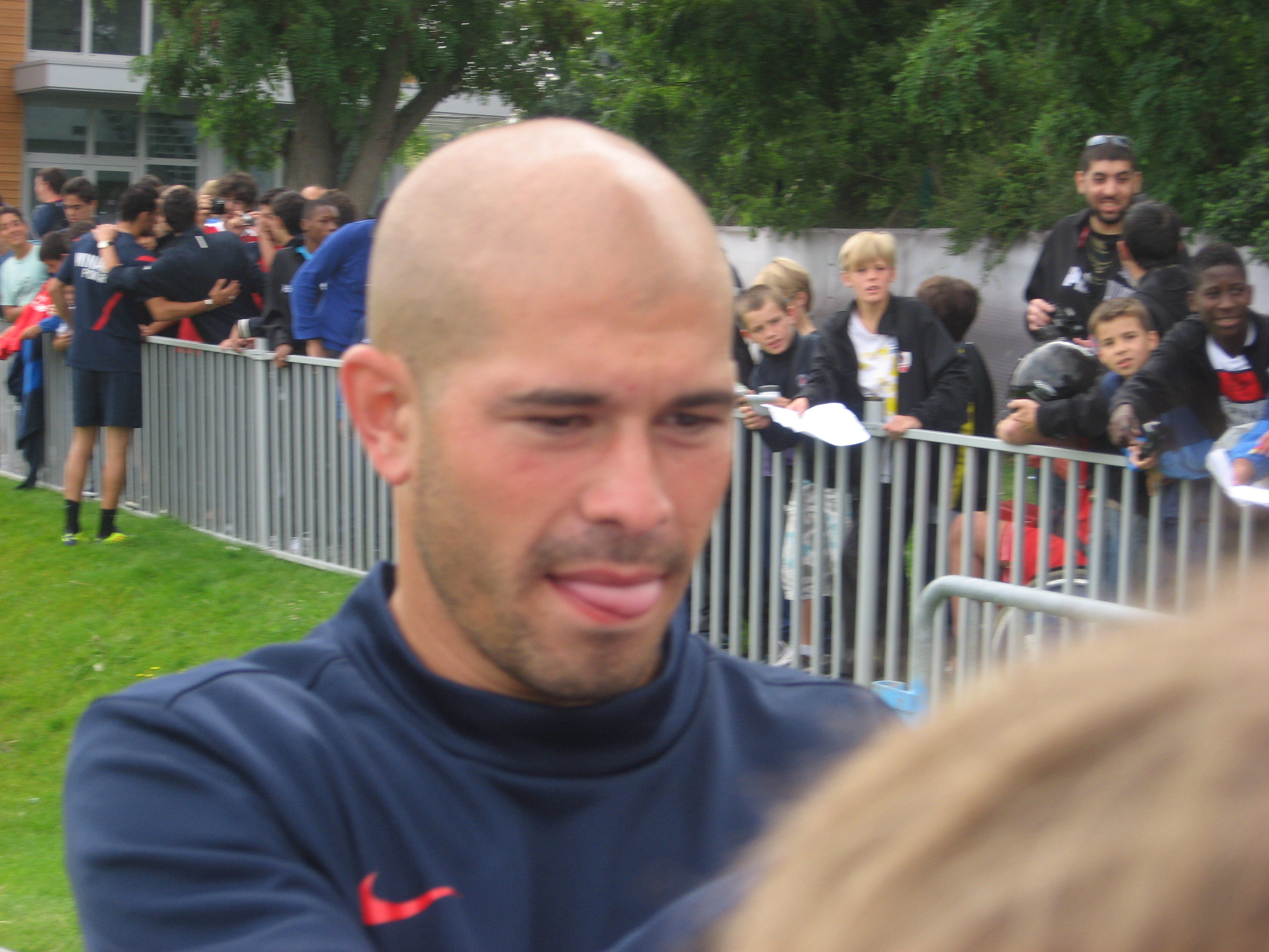 Christophe Jallet signant des autographes au camps de loges